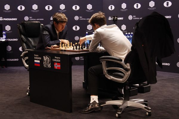 Карлсен — Карякин, тай-брейк